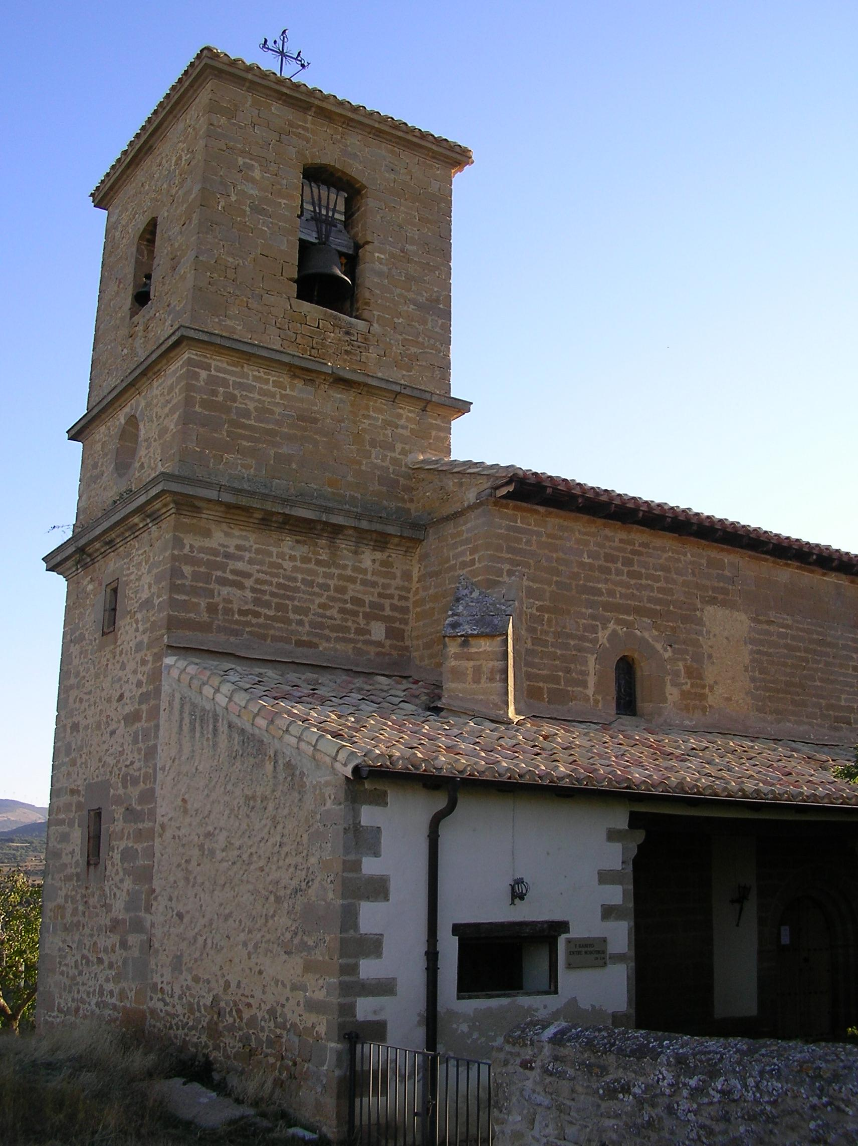 Iglesia de Solchaga (Navarra, España) / Church of Solchaga (Navarre, Spain)